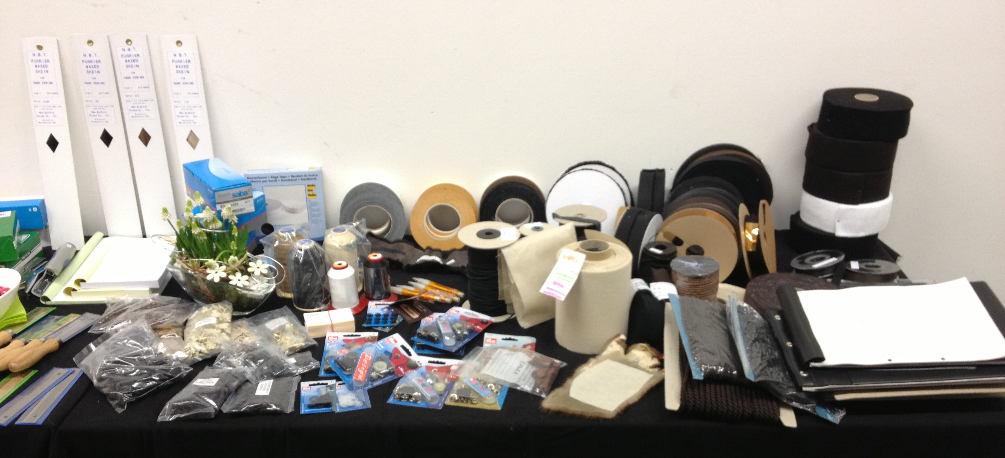 Ausstellung der Pelzzutatenhandlung H. Espey, Gladbeck.